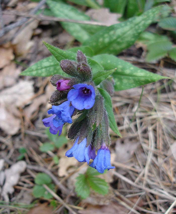 Pulmonaria affinis, photo prise à Rabouillet (France) en avril 2005.